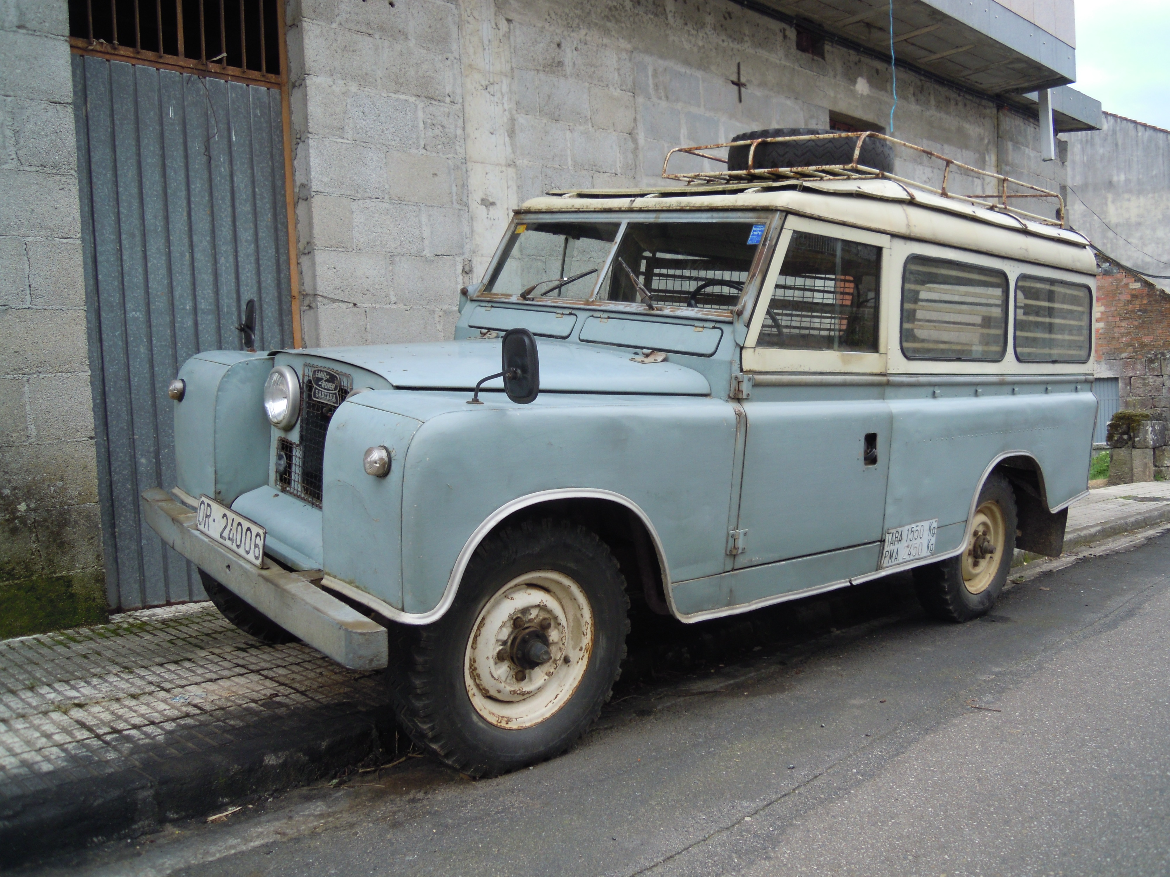 Land Rover Santana modelo Defender Serie II matriculado en 1969, aparcado no Irixo